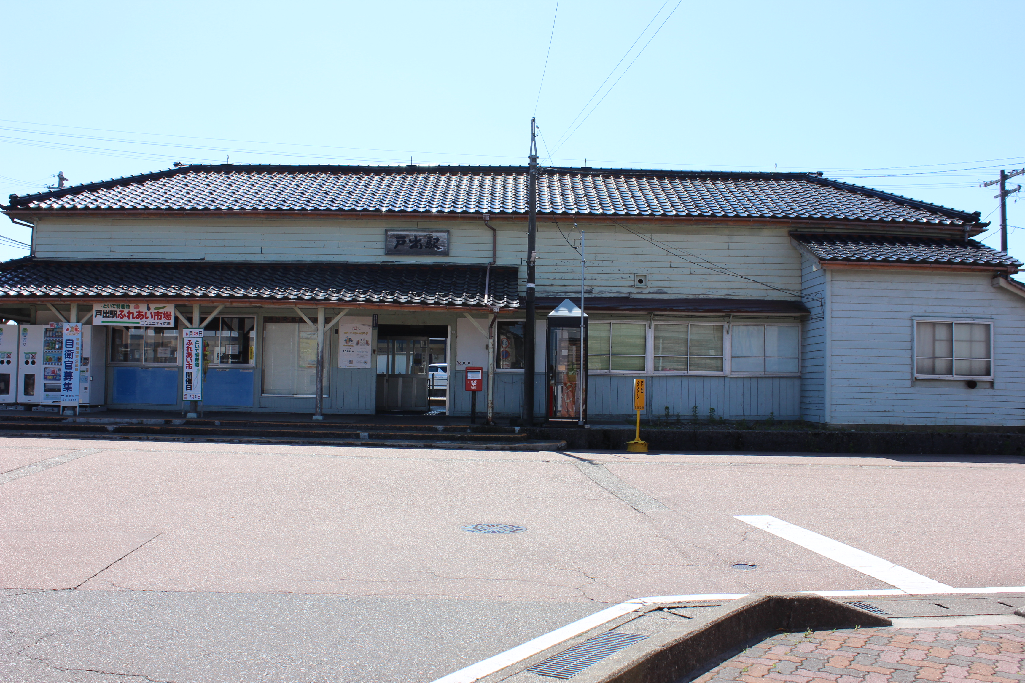 JR城端線戸出駅（富山県高岡市） Canon EOS Kiss X5